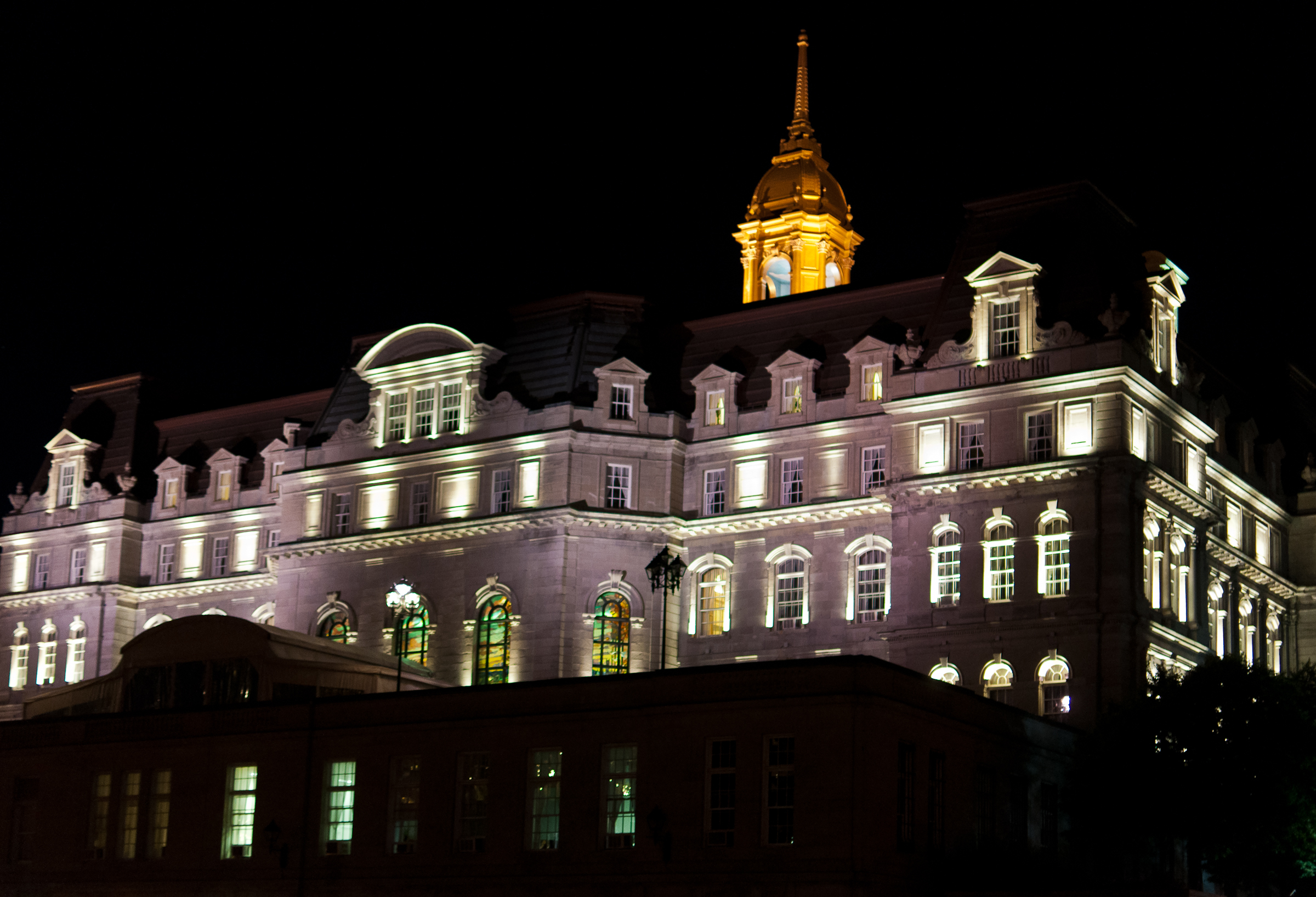 Hôtel de ville de Montréal, 275, rue Notre-Dame Est, (Canada). (Protection LHN. Voir la liste des lieux patrimoniaux de Montréal pour plus de détails).